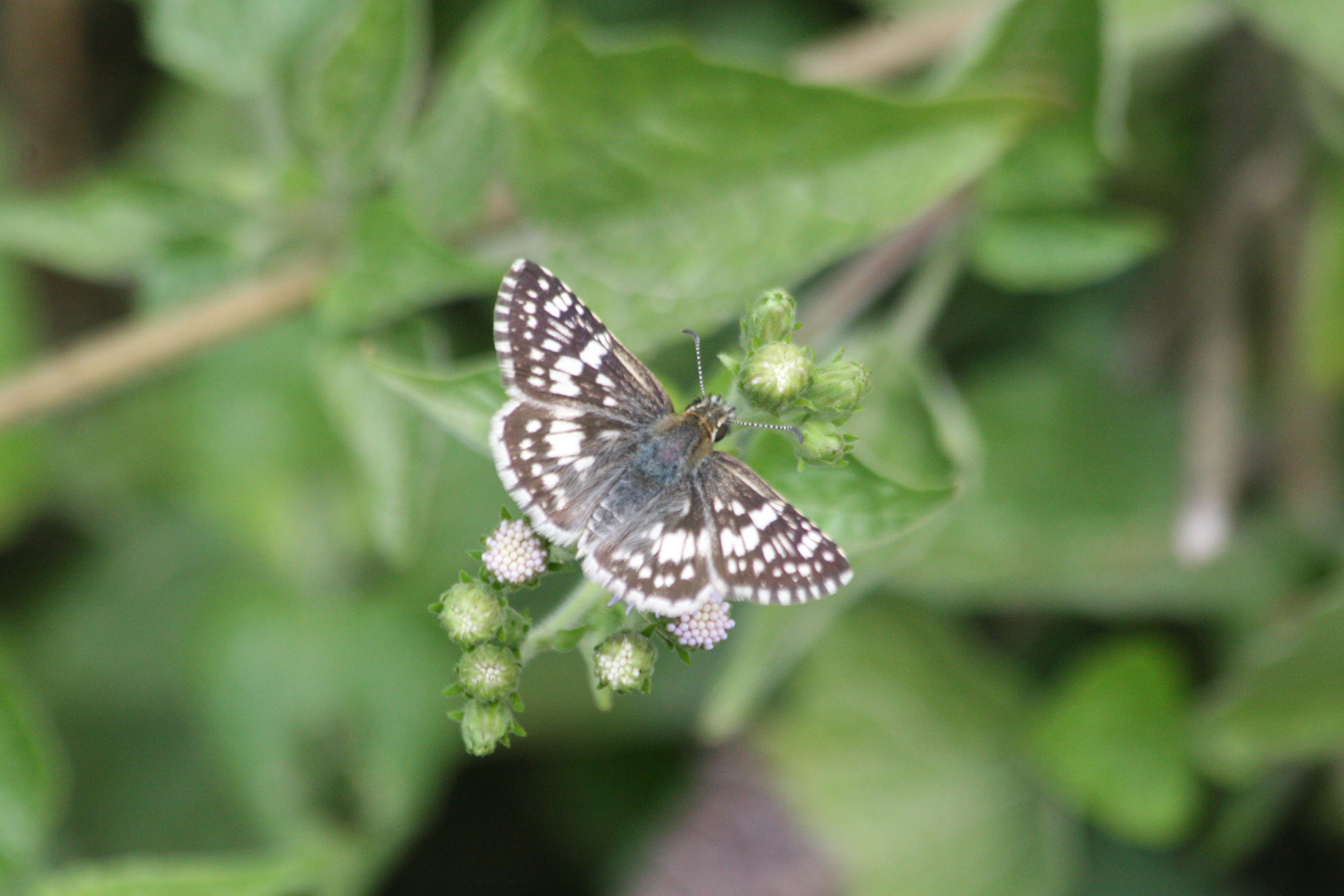 Pyrgus albescens